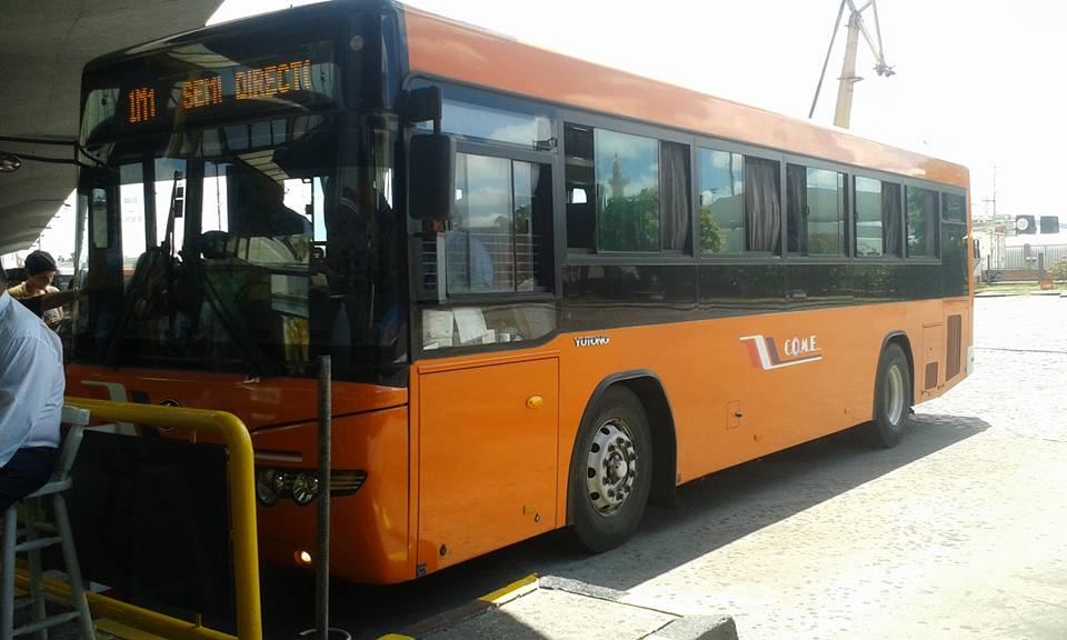 Yutong Uruguay Come SA 1M1